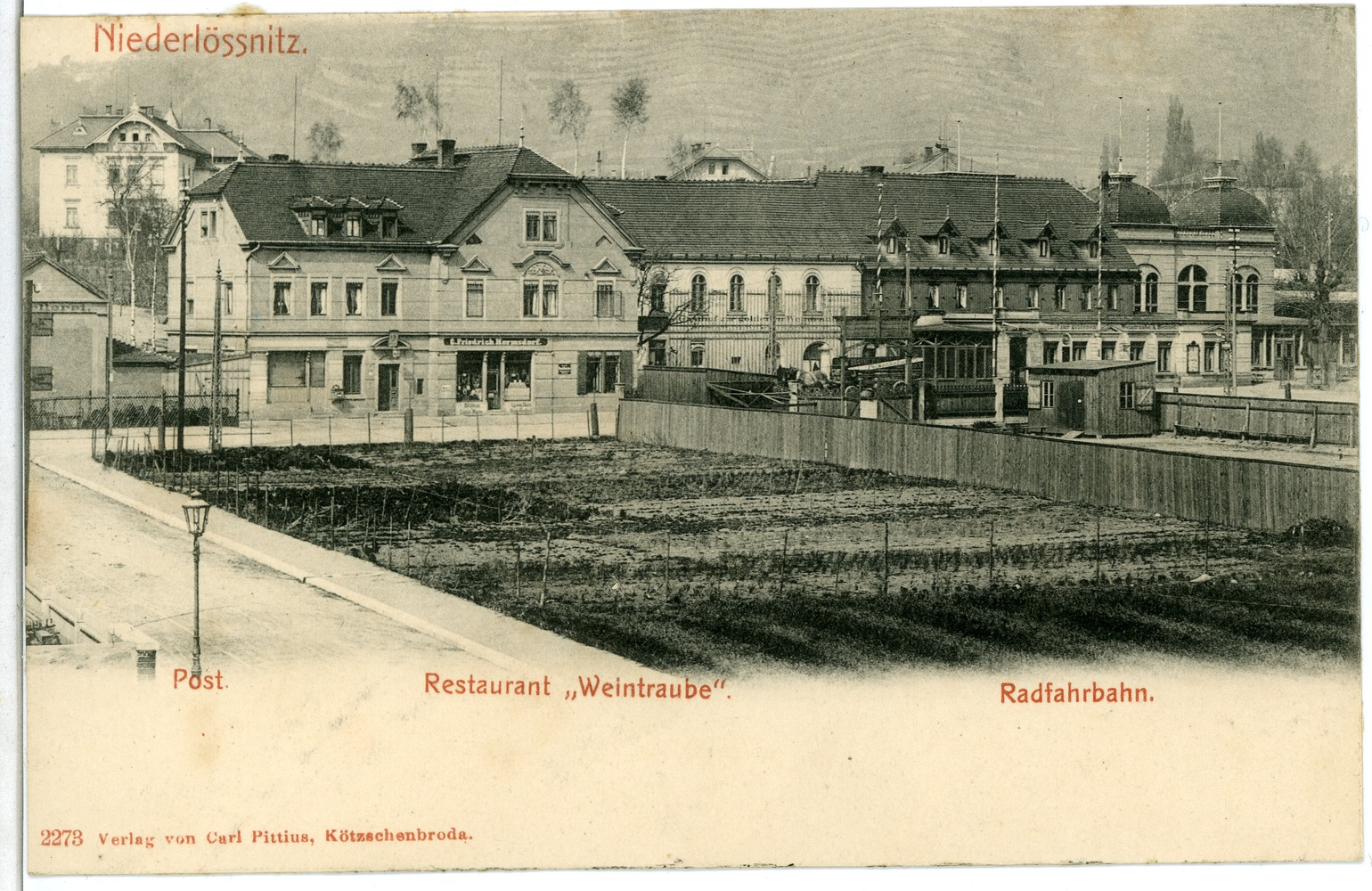 Niederlößnitz; Radfahrbahn, Restaurant "Weintraube" This postcard is from publisher Brück & Sohn in Meißen ( postcard has a unique number 02273 and is available in a higher resolution at the publisher. This images was uploaded in a cooperation project between Wikipedians and the publisher.